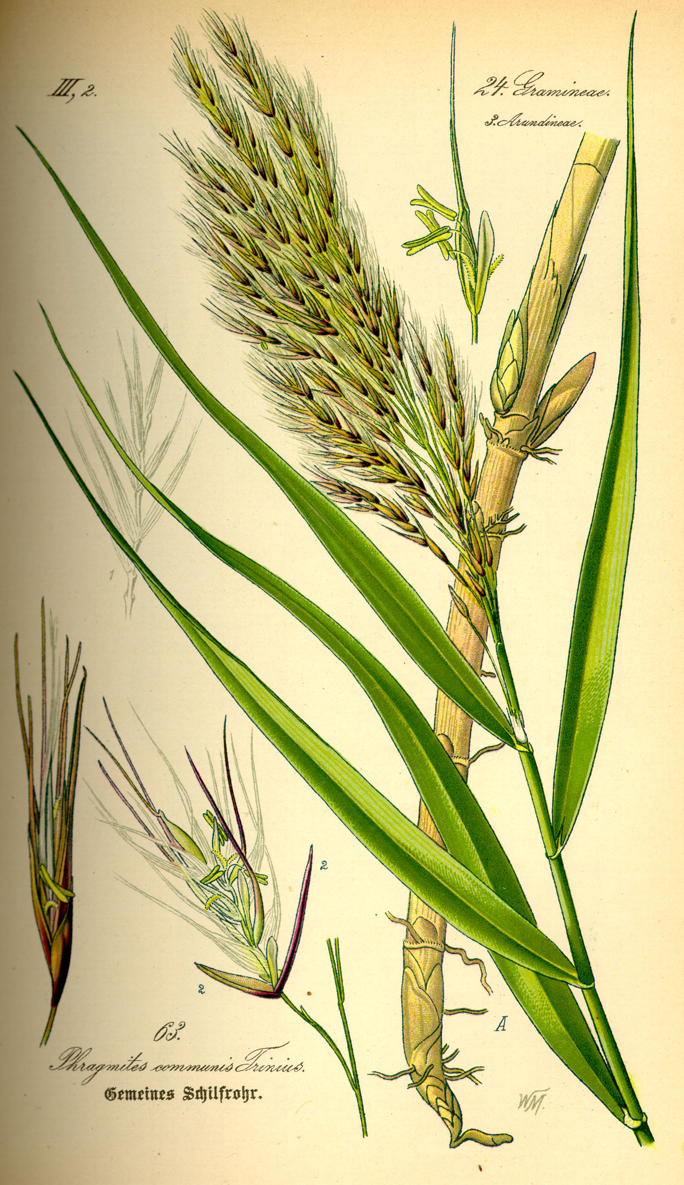 Phragmites australis (Cav.) Trin. ex Steud., 1840